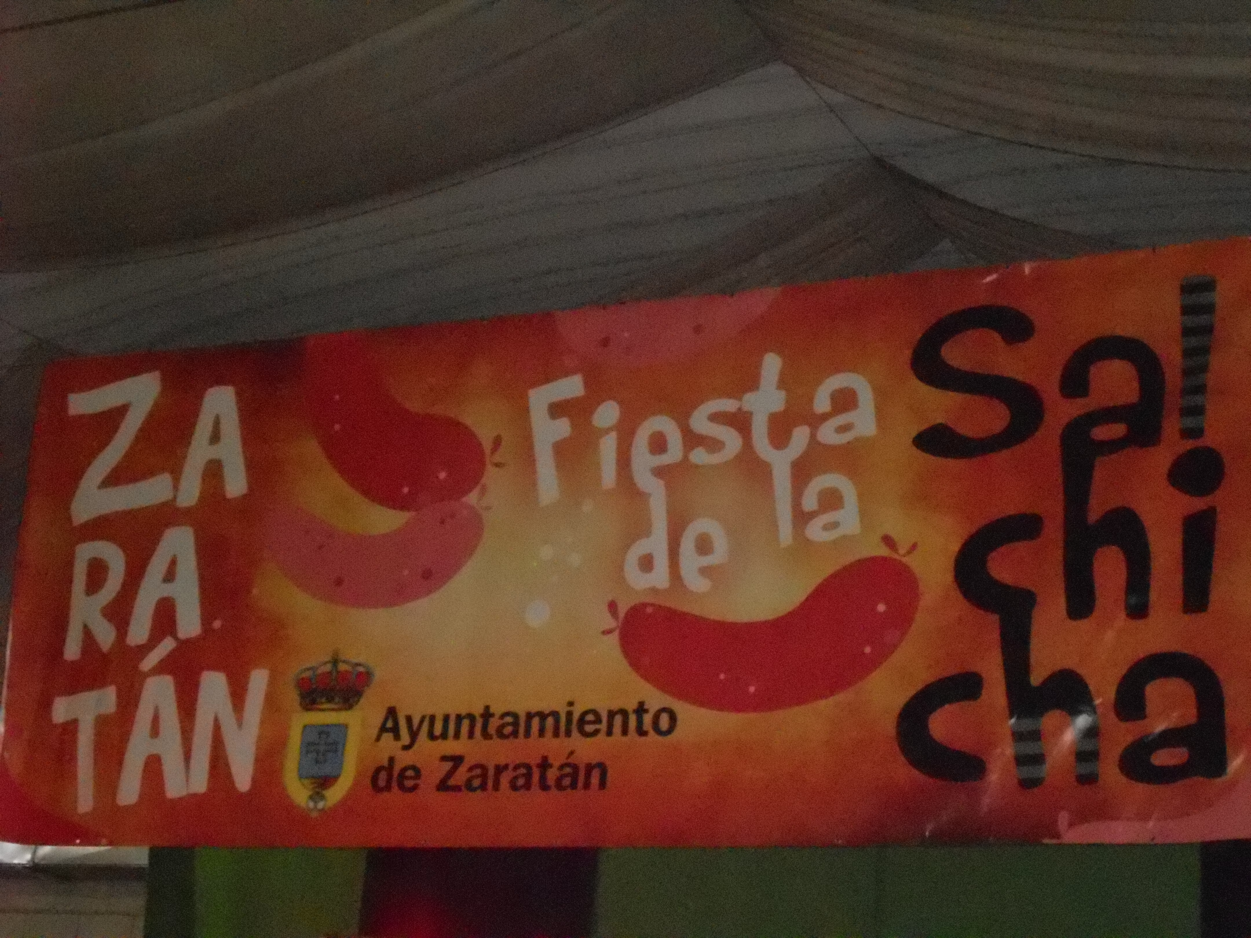 Pancarta del escenario de la celebración de la fiesta de la salchicha en Zaratán.